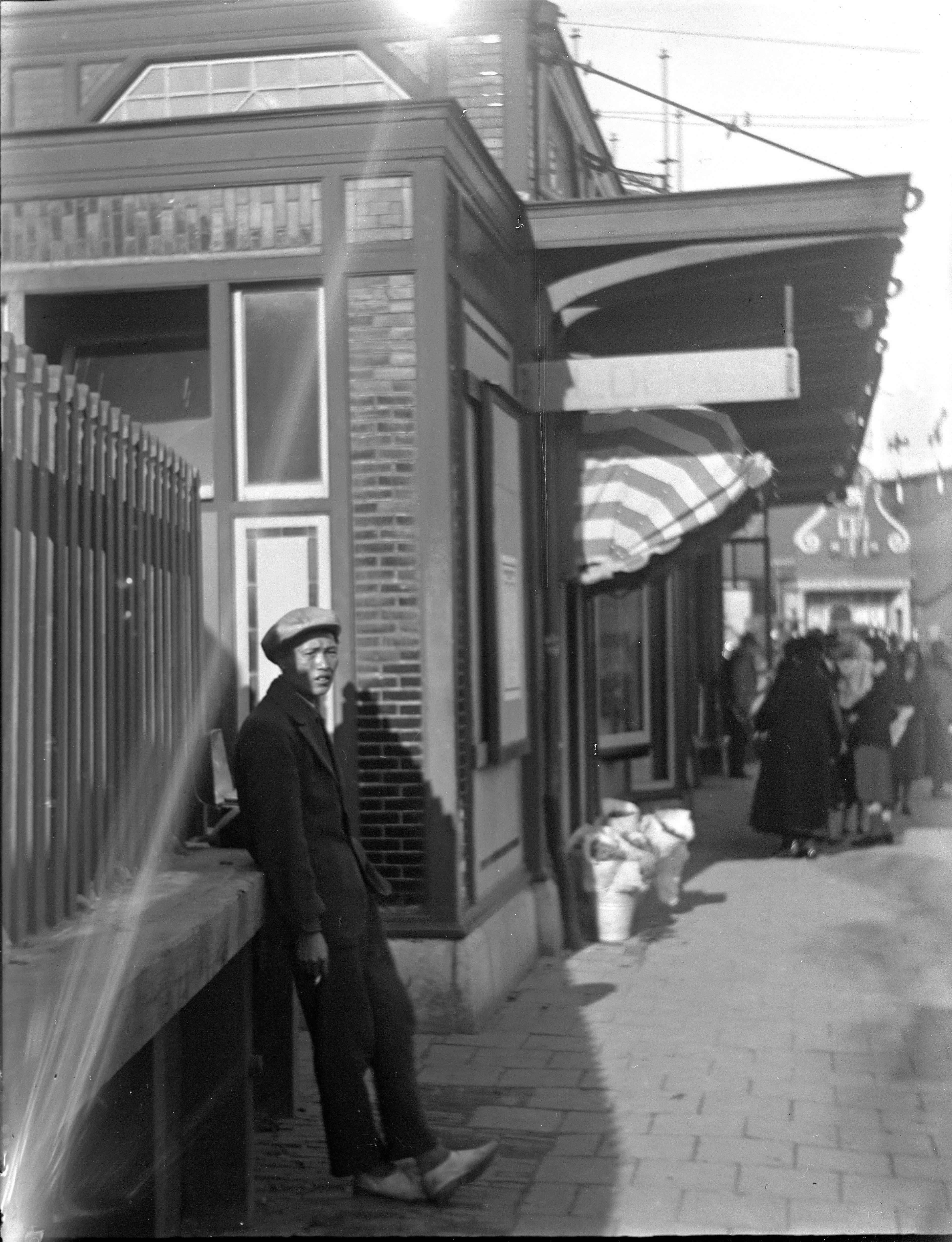 Chinese pindaverkoper, 1932, waarschijnlijk in Leiden